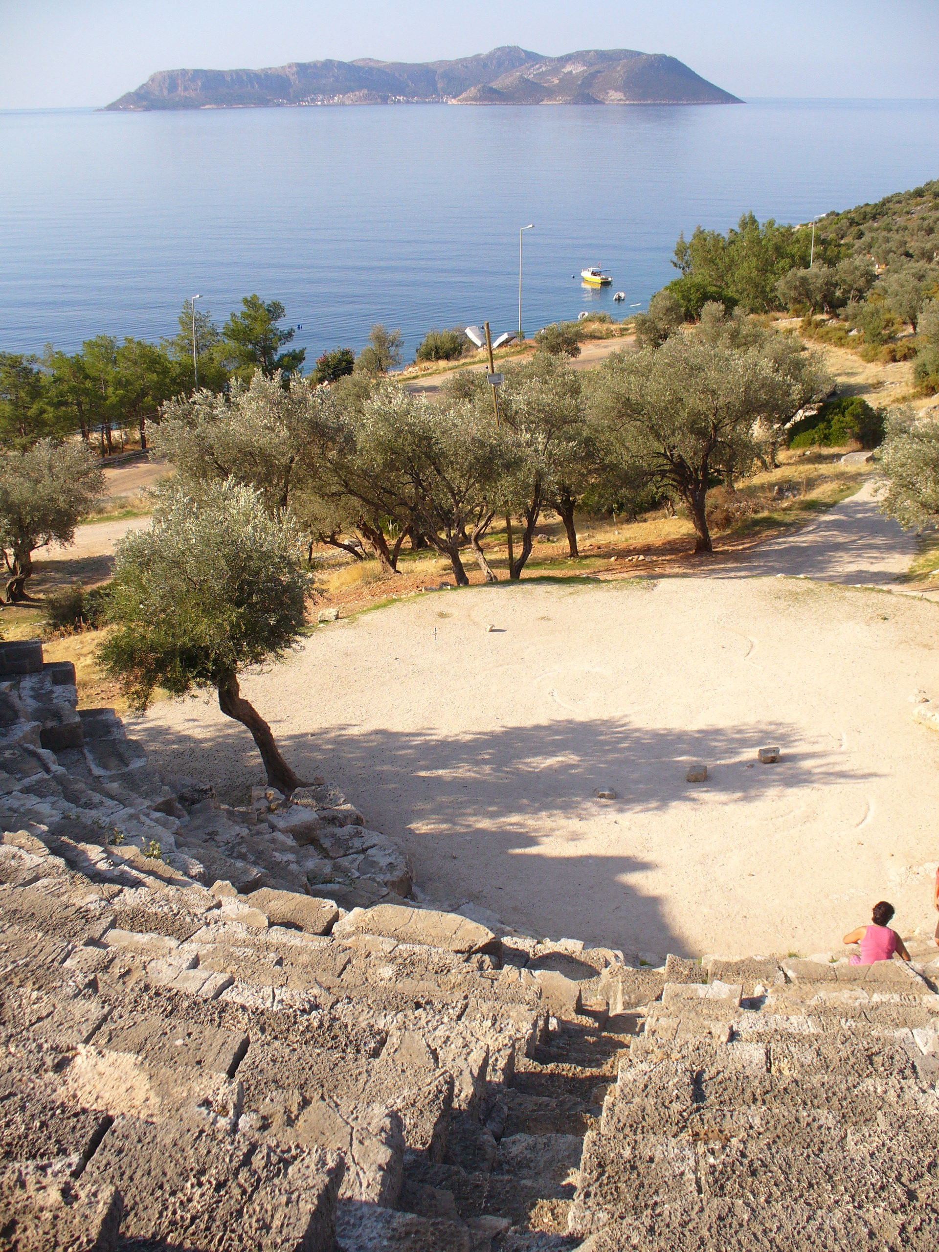 La petite île grecque de Kastellorizo vue du théâtre antique à Kaş en Lycie.